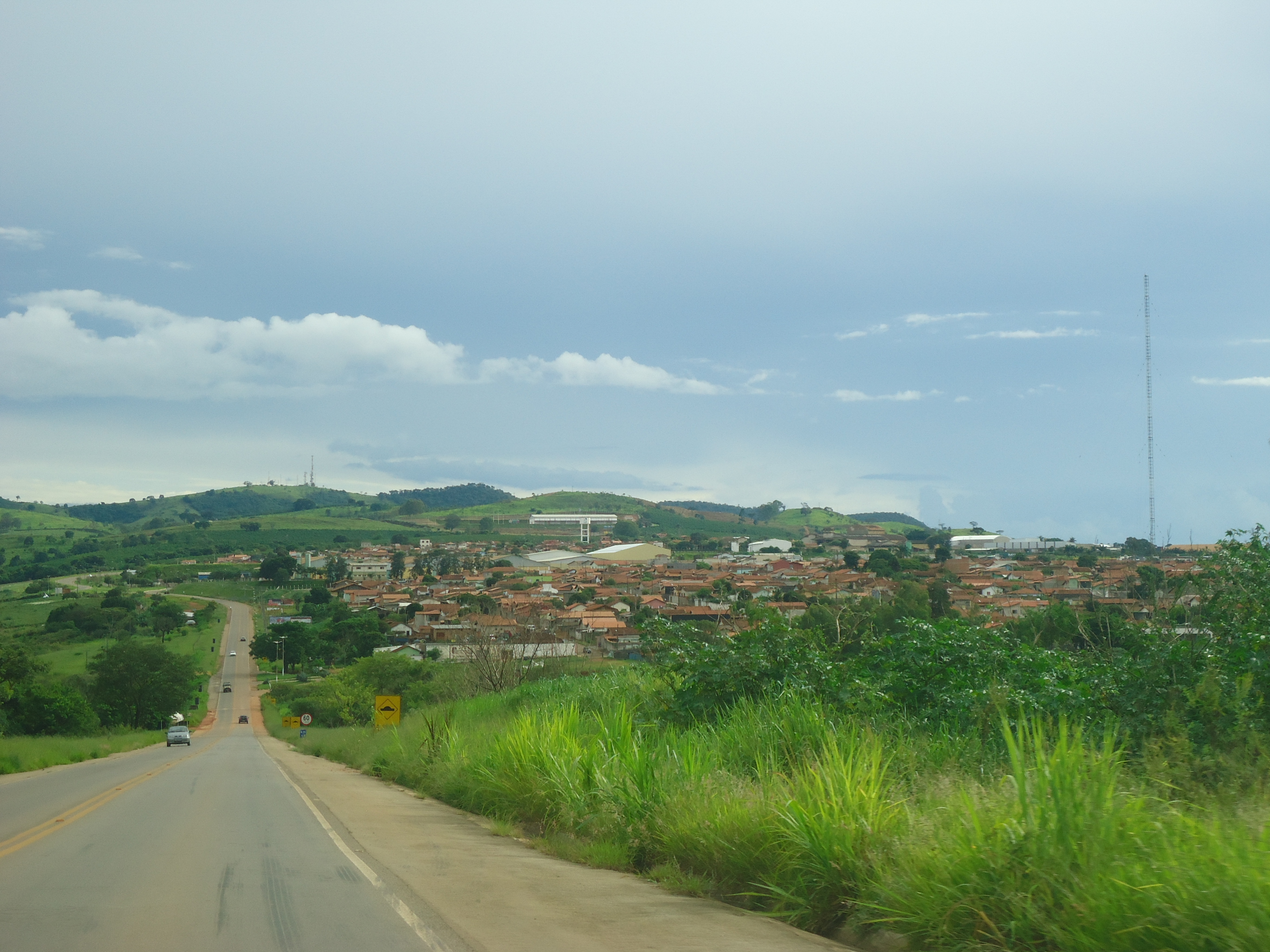 Vista da rodovia MG 167 que margeia a parte oeste da zona urbana